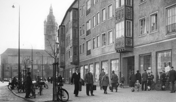 Dessau, Zerbster Straße, Neubauten Zentralbild Klein 17.10.1953 Vom neuen Dessau Dessau ist eine Industrie-Stadt, deren Entstehung in die Zeit um 1180 zurückreicht. Sie wurde wie viele andere Städte unserer Heimat ein Opfer des Bombenterrors im 2.Weltkrieg. Der 7.März 1945 ist der schwärzeste Tag in der Geschichte der Stadt. Dessau musste einen schweren Luftangriff über sich ergehen lassen und wurde zu über 80% zerstört. In der Nazizeit wurde die Stadt zu einem Rüstungszentrum der Faschisten. Sie erlebte damals eine Scheinblüte des industriellen Aufschwungs. Doch bald zeigte sich, wohin dieser Irrweg führte, nämlich geradewegs zum 7.März 1945. Nach der Befreiung unserer Heimat vom Faschismus durch die Armee der Sowjetunion wurde, wie viele andere Städte, auch Dessau zu einem Bauplatz der friedlichen Arbeit für ein besseres Leben. Bereits 1951 und 1952 sind in der Zerbster Strasse hunderte neue Wohnungen errichtet worden. Durch die neuen Maßnahmen unserer Regierung wird der Wohnungsbau nun in weit grösserem Maße durchgeführt. Gemeinsam schaffen die Bevölkerung und die Verwaltungsorgane an dem Ziel, die alte, im Kriege zerstörte Stadt schöner denn je wieder aufzubauen. UBz: Die Zerbster Strasse. Bisher wurden hier 300 Wohnungen gebaut und 16 Läden sorgen für eine gute Versorgung der Bevölkerung mit Lebensmitteln und Industriewaren.